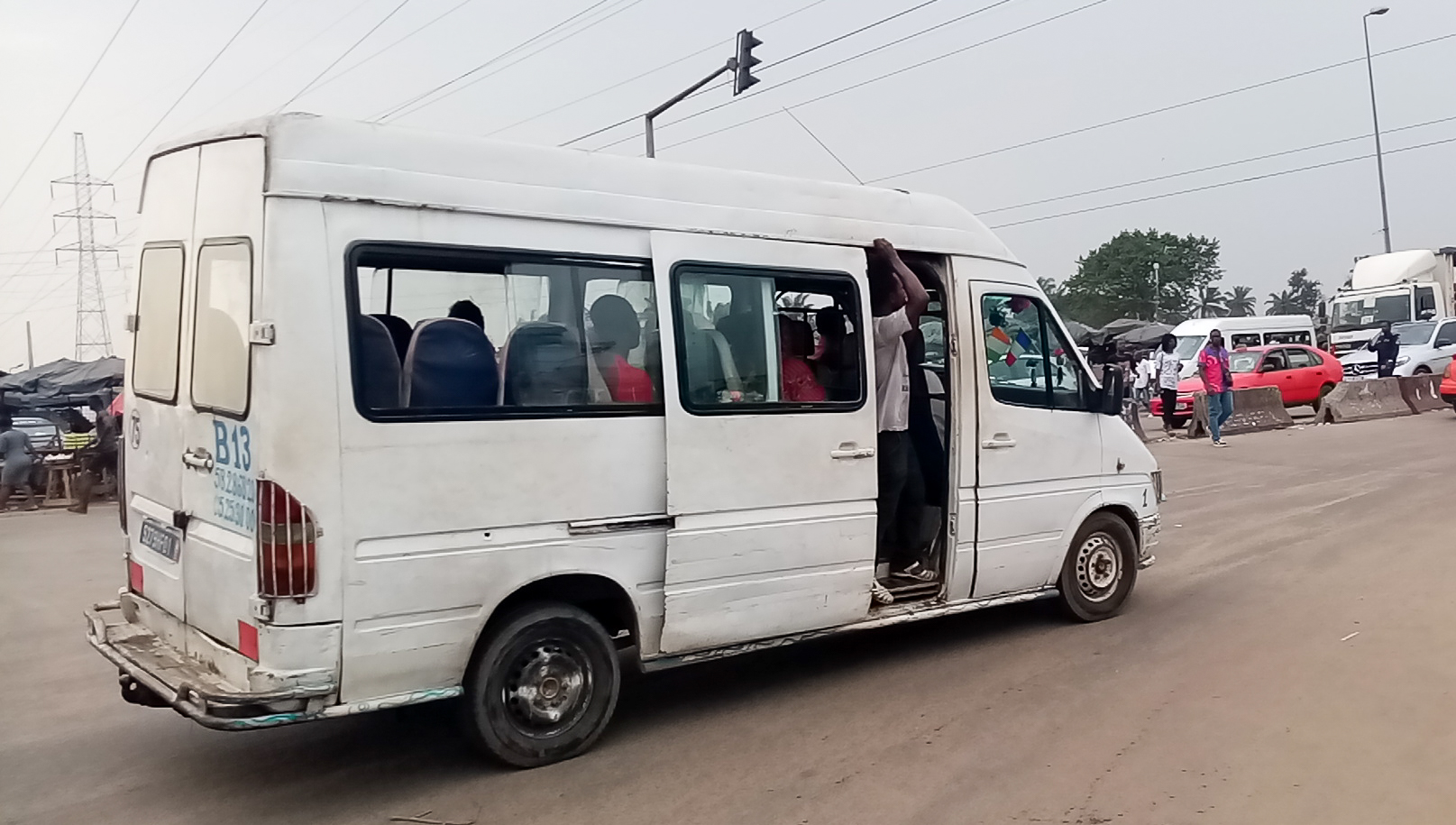 Les Gbakas sont des véhicules de transport intercommunaux de personnes à Abidjan en Côte d'Ivoire This is an image with the theme "Africa on the Move or Transport" from: Ivory Coast